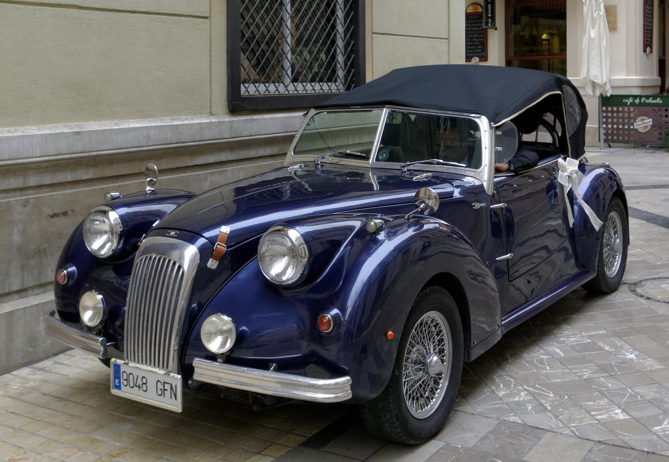 Hurtan Albaycín T2